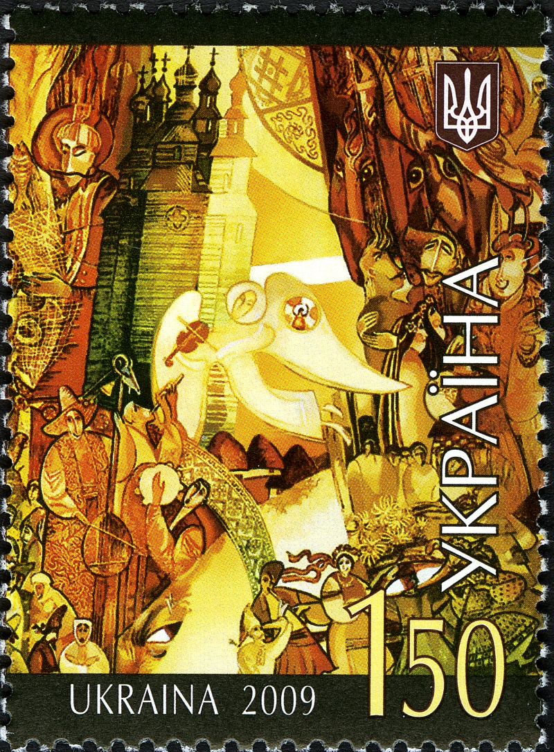 Поштова марка України "Жартівливі пісні"